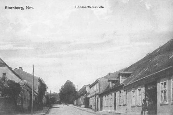 Torzym ok. 1900 Sternberg/Neumark about 1900